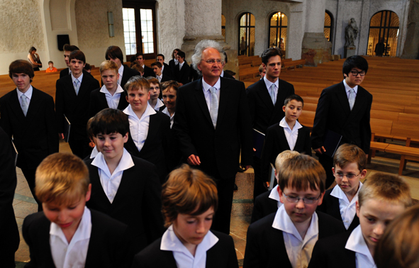 Kreuzkantor Roderich Kreile mit dem Dresdner Kreuzchor in der Dresdner Kreuzkirche vor Vesperprobe, Juni 2012